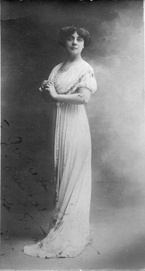 portrait